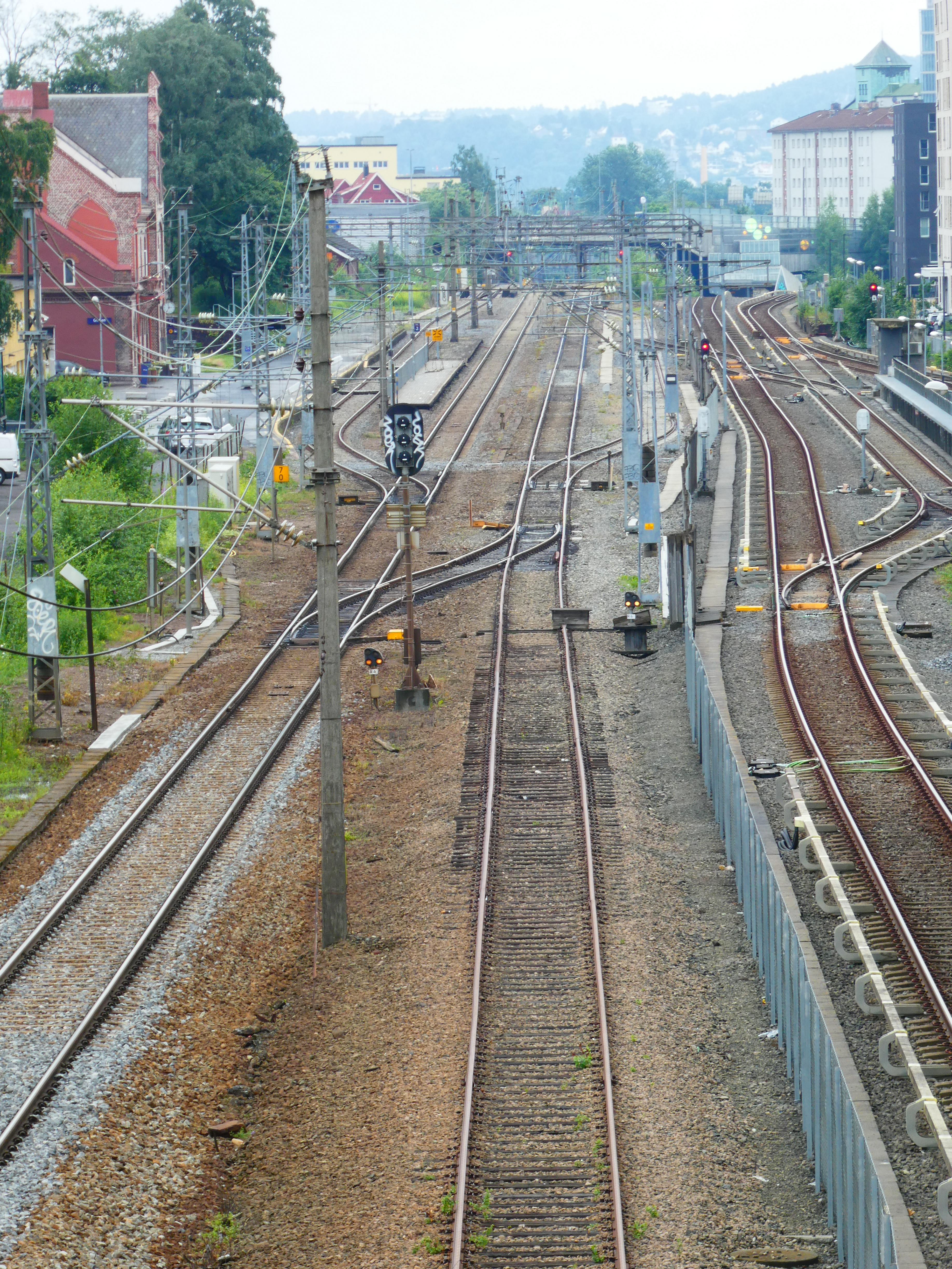 Bahnhof Grefsen (Oslo) Gleisanlagen von Norden aus gesehen